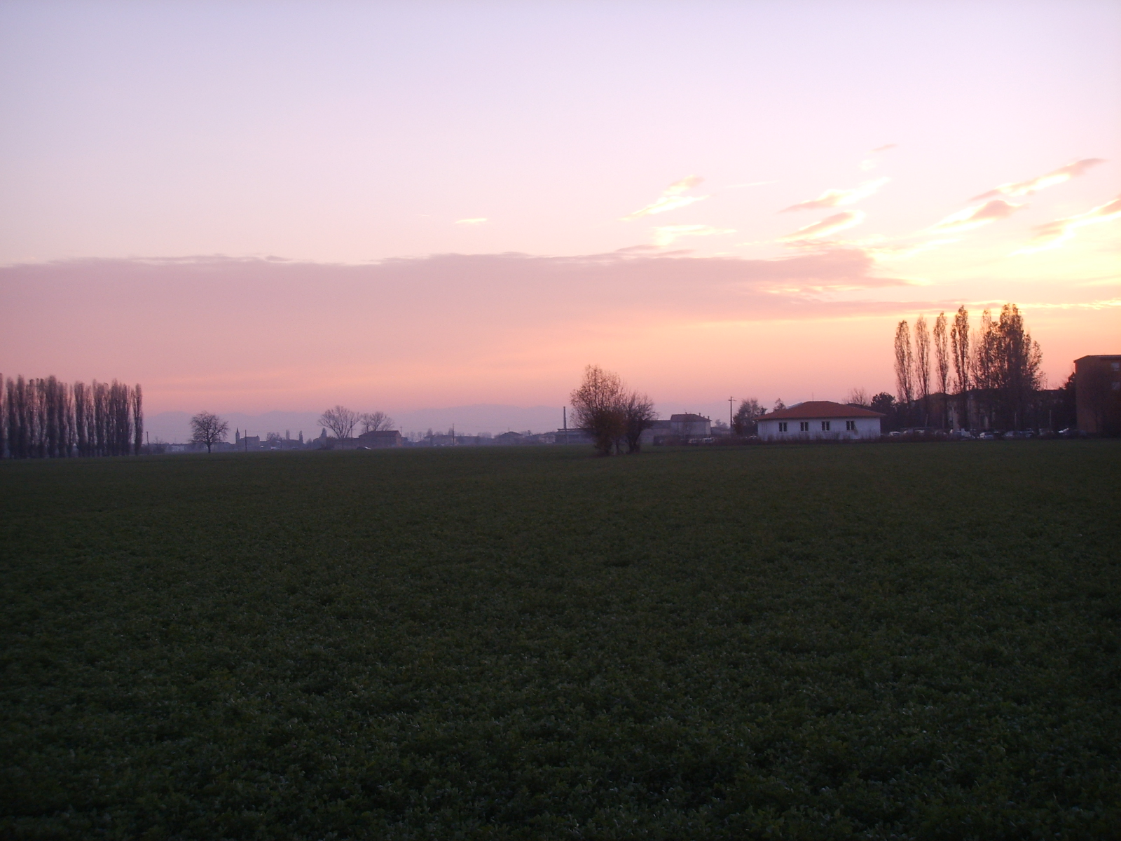 Bassa padana al tramonto (provincia di parma)